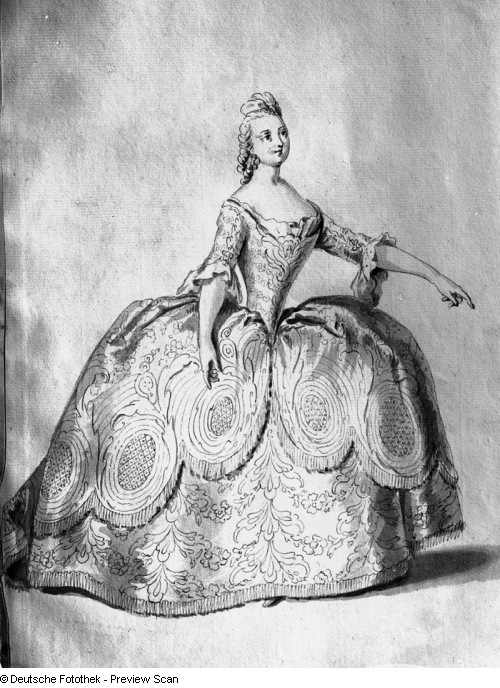 Teresa Albuzzi als Elpinice in "Ipermestra" von Johann Adolph Hasse. Hoftheater Dresden, Uraufführung in Hubertusburg, 7. Oktober 1751. Kostümbildner: Servandoni Federzeichnung von Francesco Ponte in: Vestiarium der Oper "Ipermestra". Dresden: Kupferstich-Kabinett Ca 104 Blatt 2